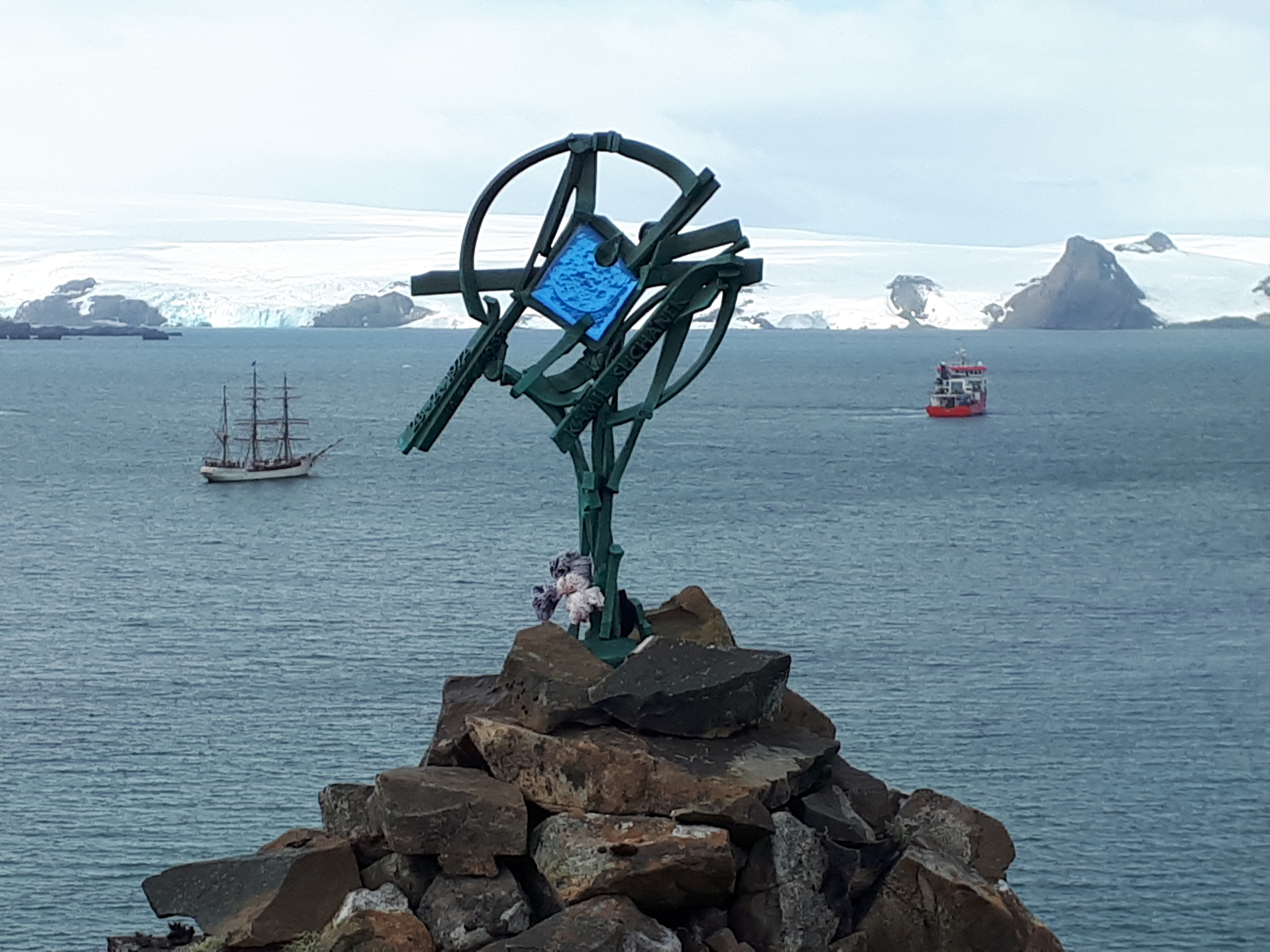 Pomnicek Kamilu Suchankovi na ostrove King George Island